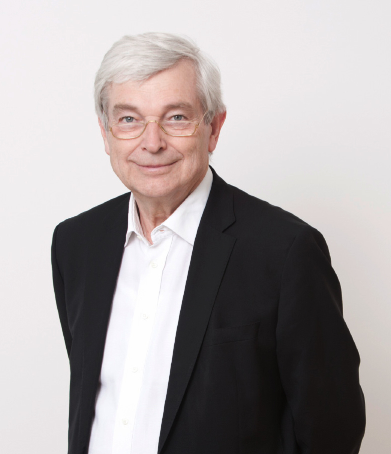 Porträt von Univ.Prof.Dr. Rudolf Wimmer